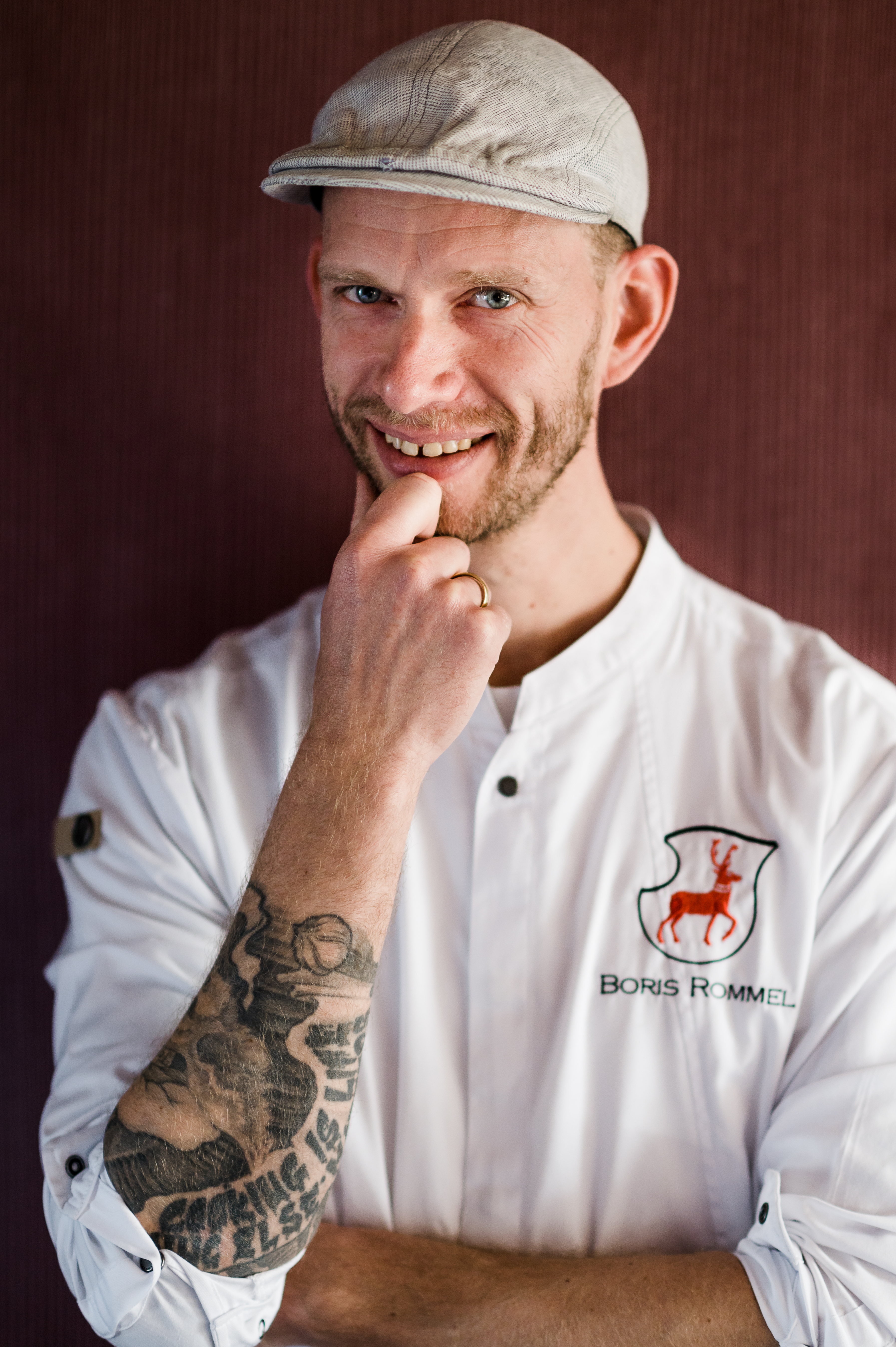 Boris Rommel - deutscher Sternekoch